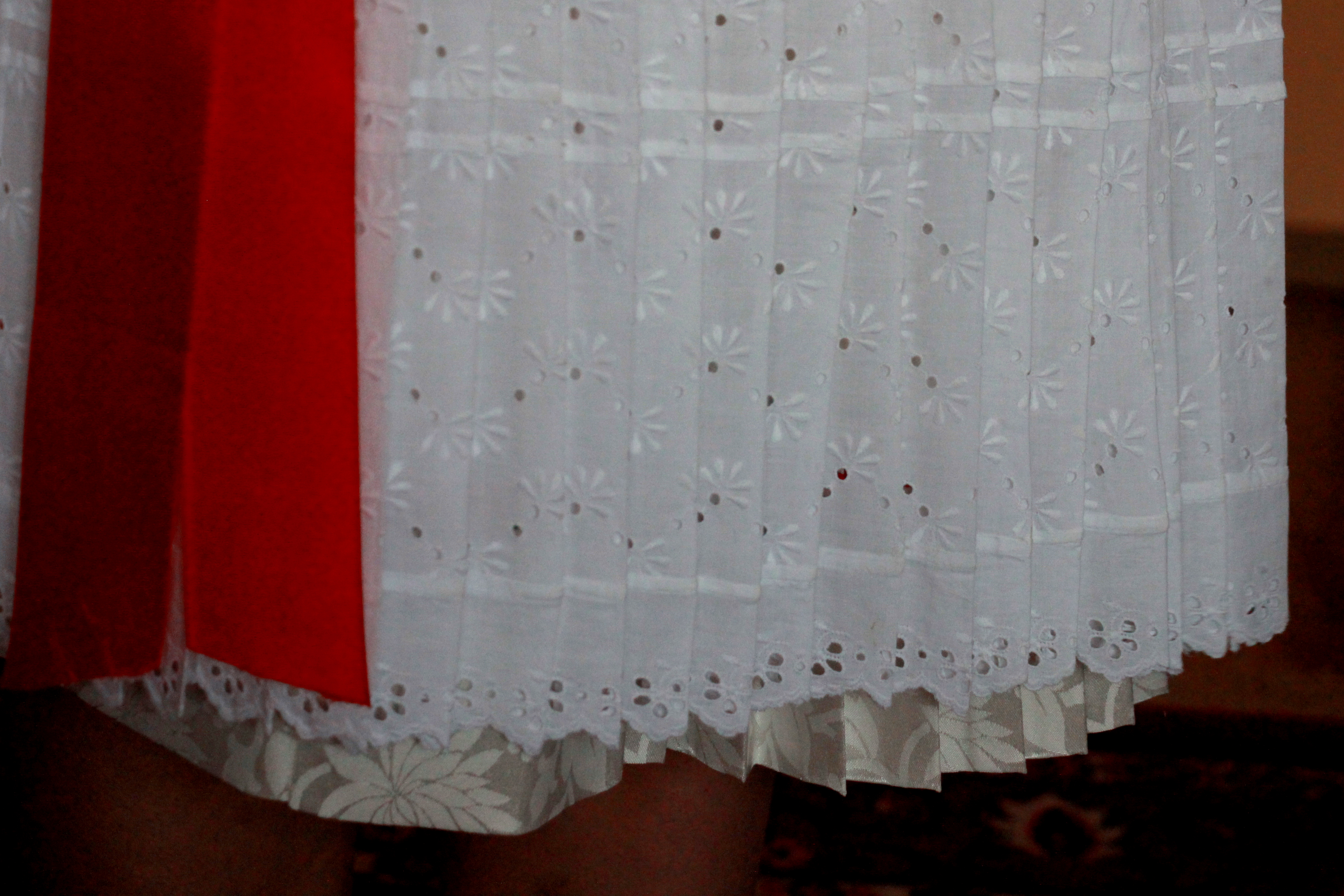 Część stroju słowackiej panny młodej - wykonanie współczesne, Veronika Žembová.